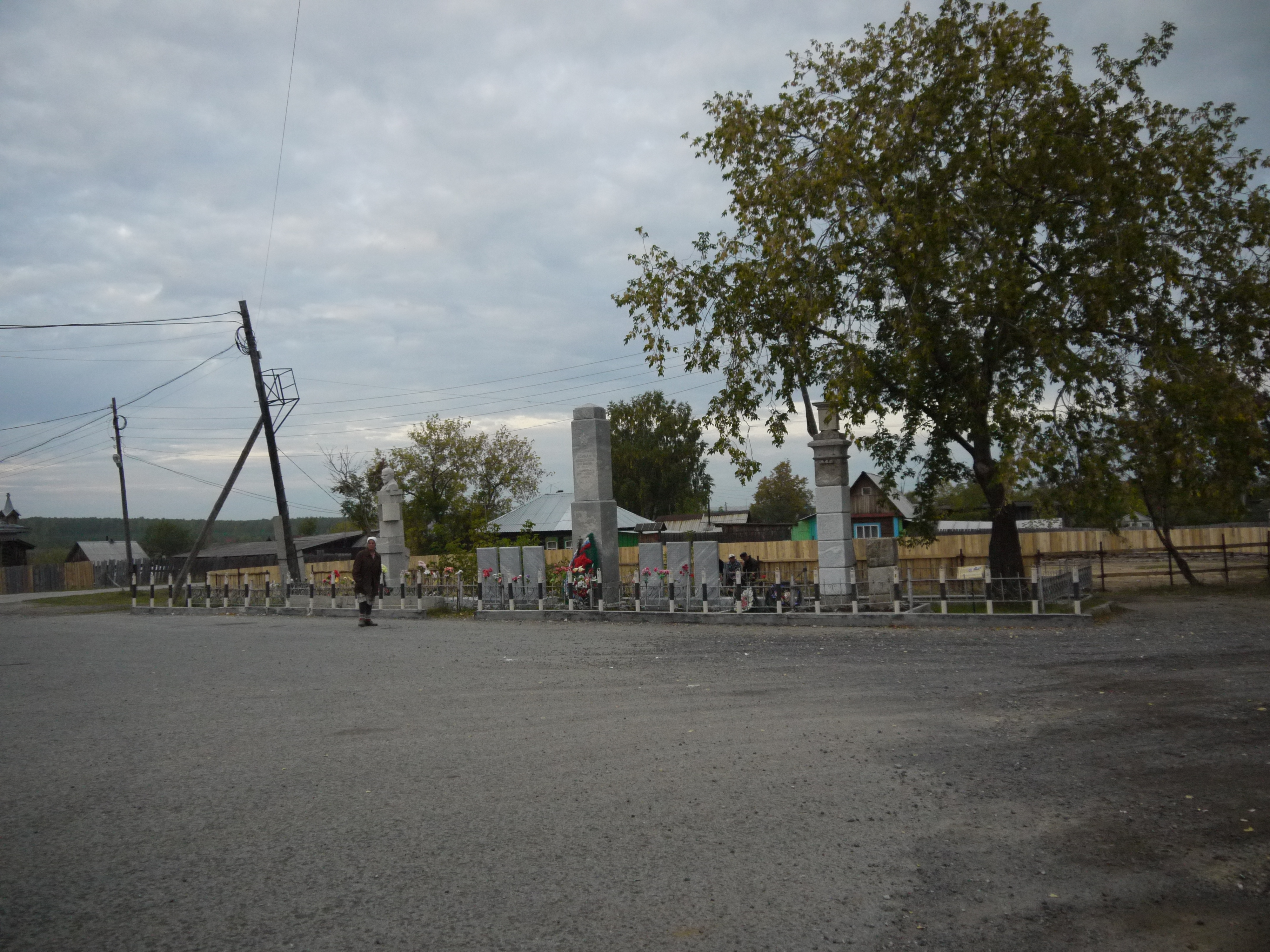 Мемориальный комплекс в селе Мраморское